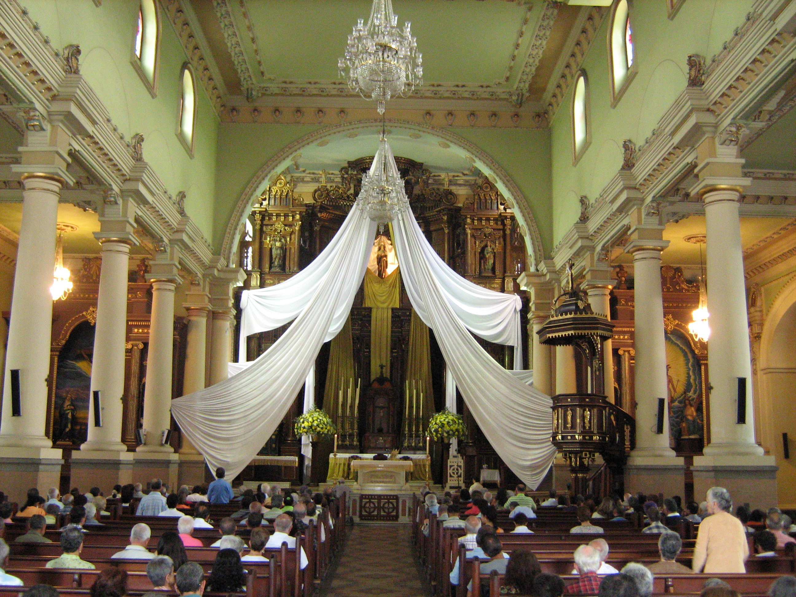 Iglesia de Santa Gertrudis en Envidado, Antioquia, Colombia